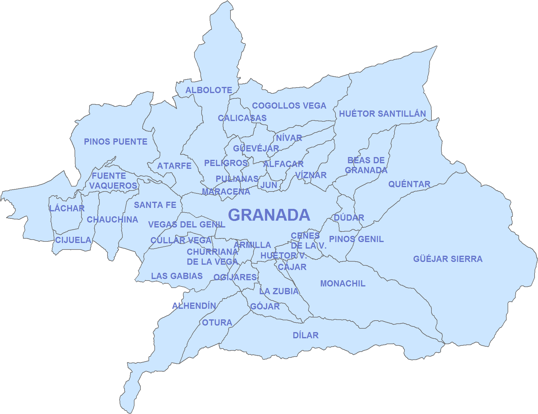 Mapa de la comarca de la Vega de Granada, en la provincia de Granada (España).